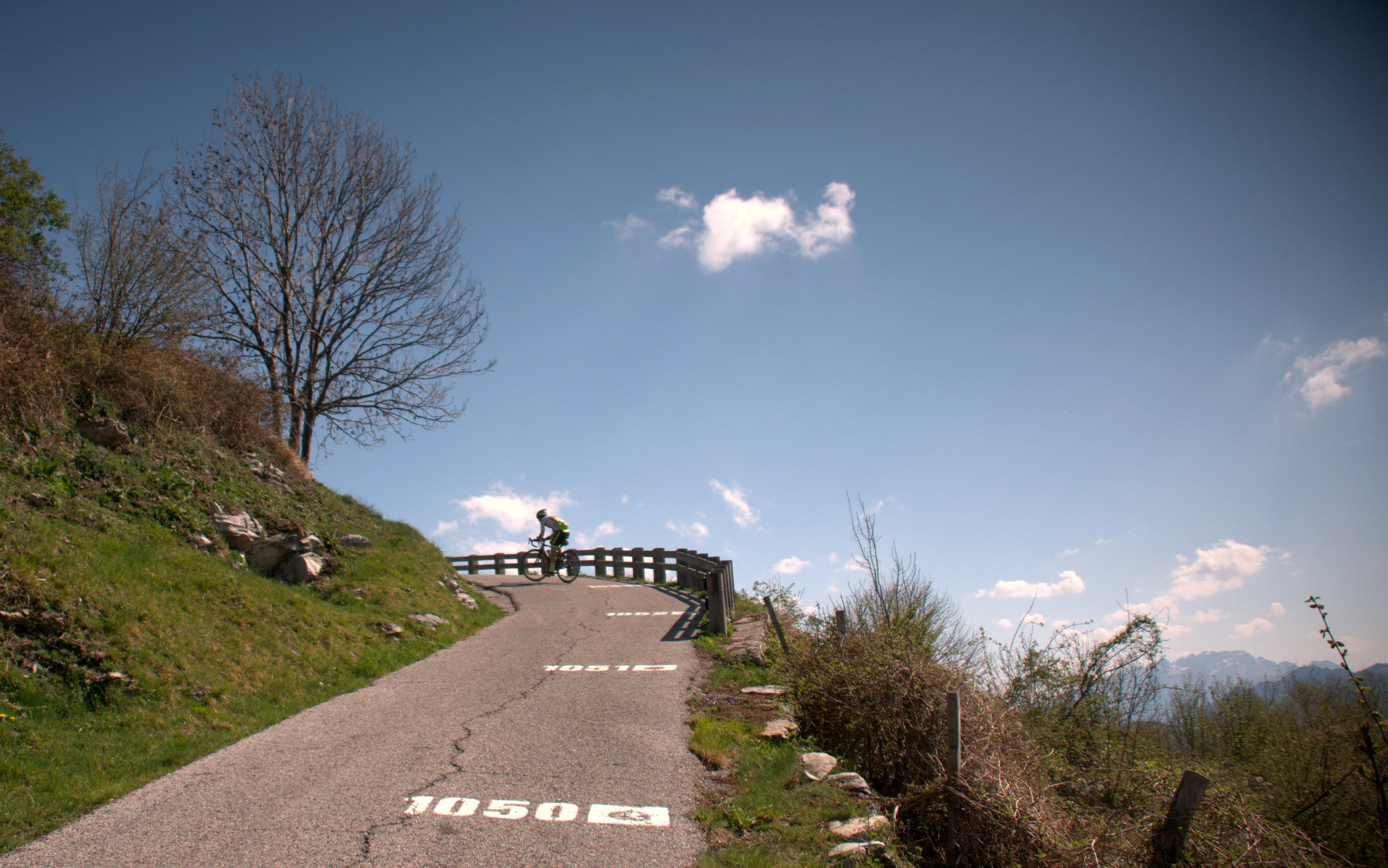 Muro di Sormano, Passauffahrt zum Colma di Sormano, nördlich von Asso in der Lombardei